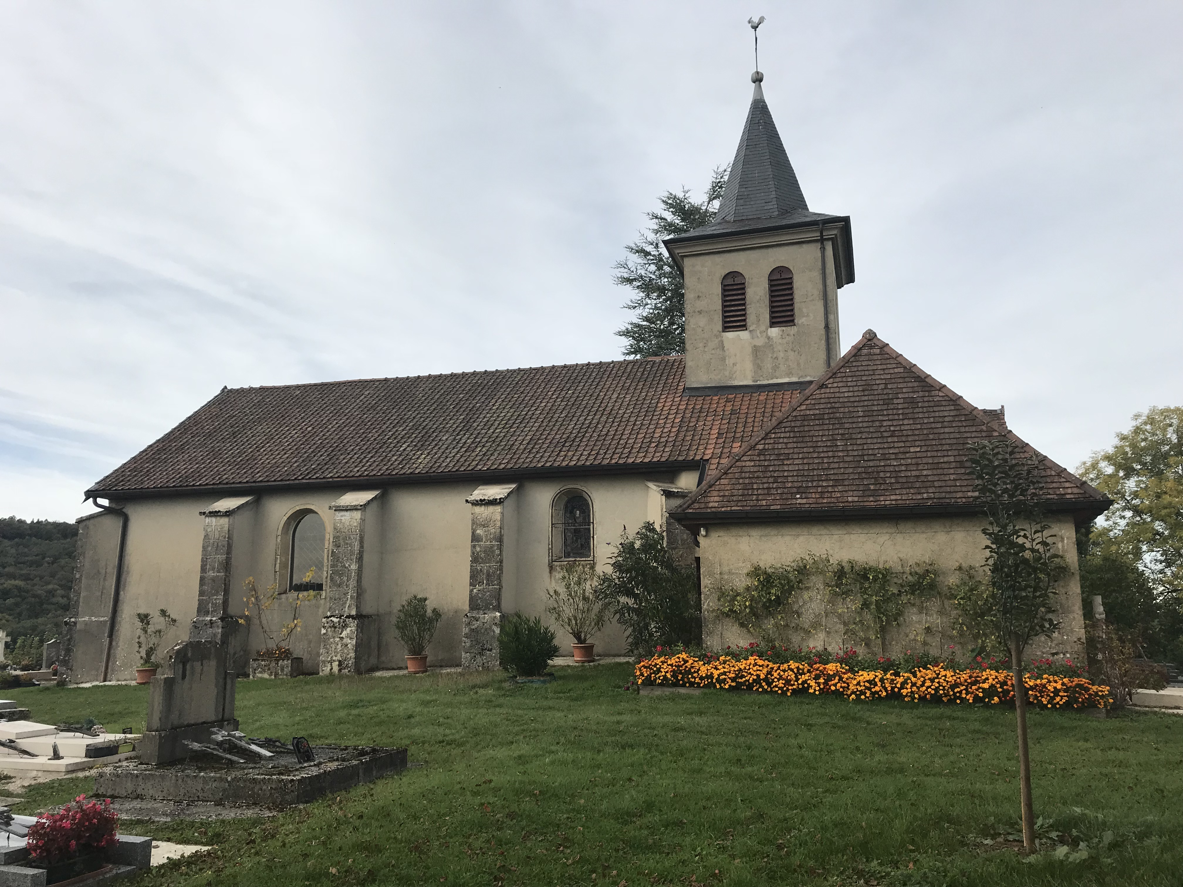 Graye-et-Charnay (Jura, France) en octobre 2017.